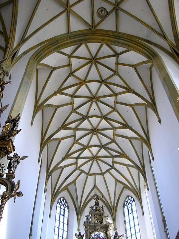 Ehemalige Benediktinerstiftskirche St. Ulrich und Afra (Augsburg, Bayerisch-Schwaben). Das Chorgewölbe. Eigene Aufnahme, März 2007 / Former Benedictine monastery church St. Ulrich and Afra (Augsburg, Bavaria, Germany). The choir. View into the vault. Own photo, March 2007